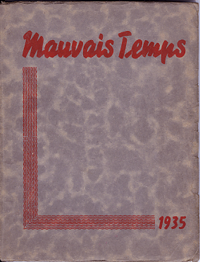 Couverture de la revue Mauvais Temps 1935, du groupe Surréaliste belge Rupture.